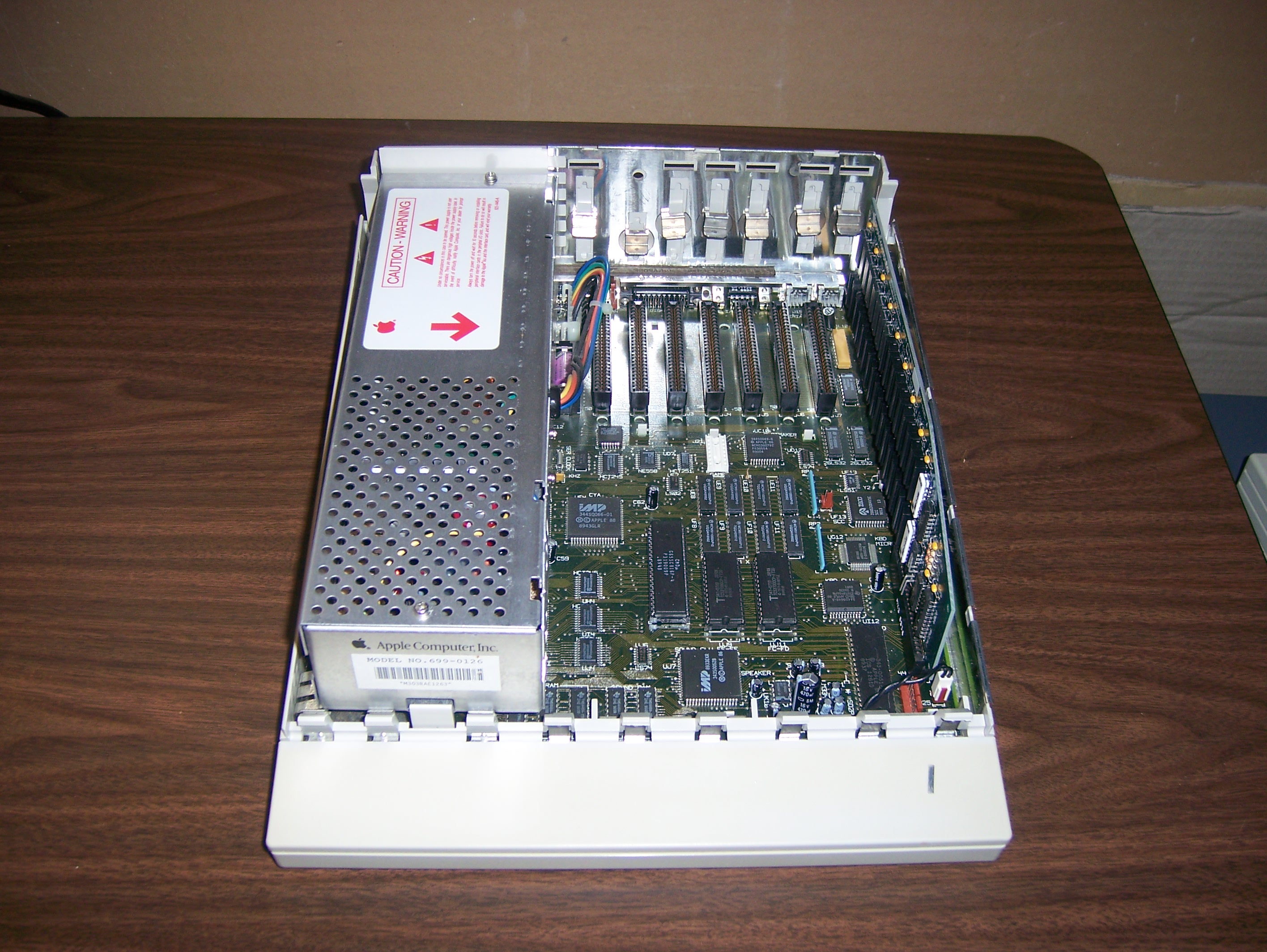 Interno di un GS.